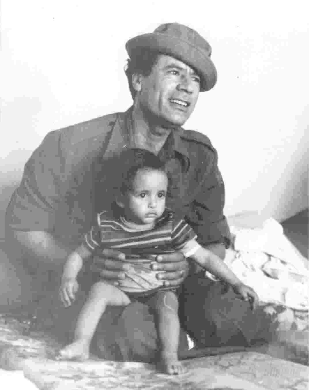 Bild des libyschen Staatschefs Gaddafi mit fremdem Kind auf dem Schoß